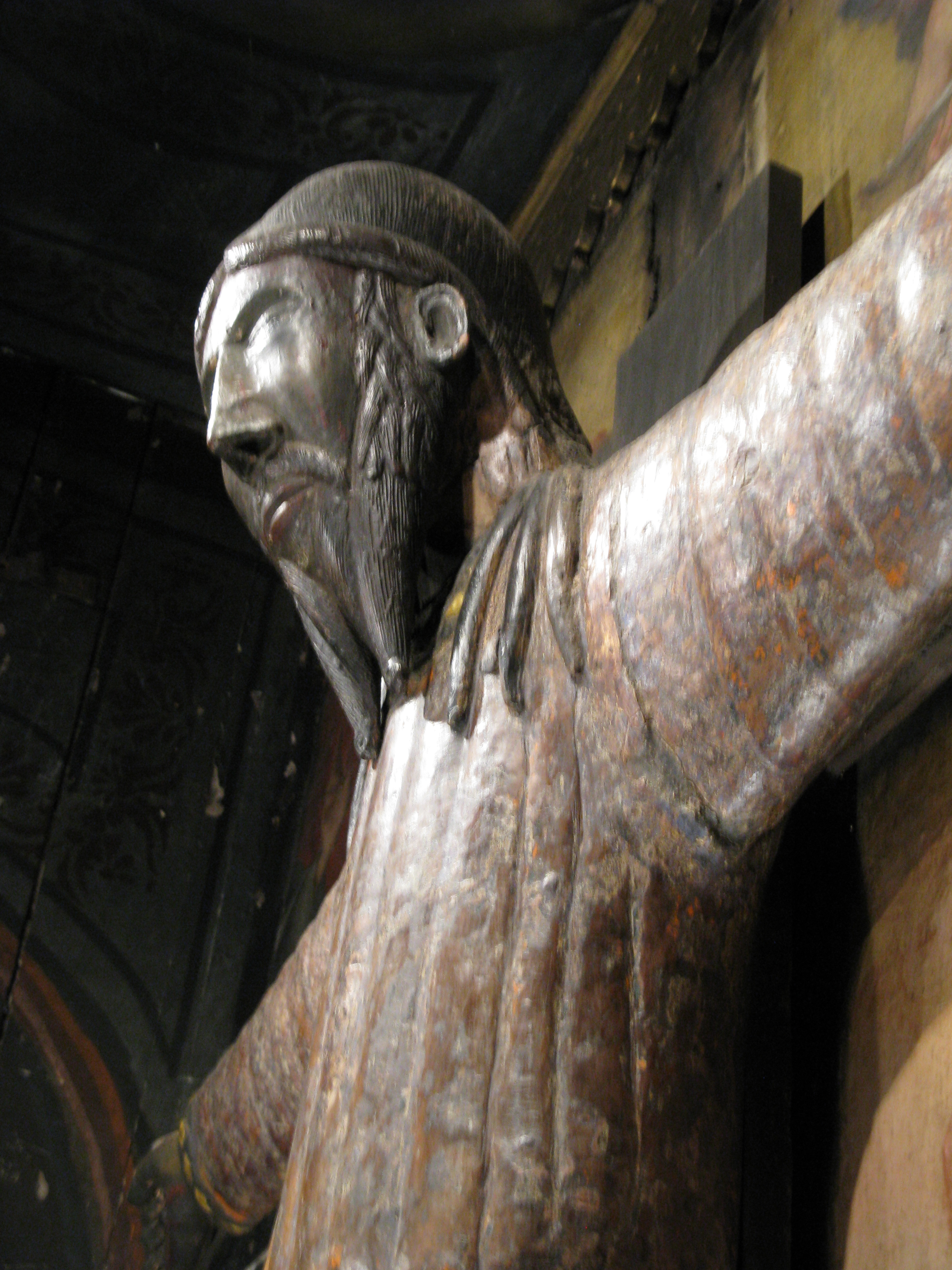 Romanischer Christus von Beget ("La Majestat", XII. Jahrhundert; Kirche "Sant Cristòfor de Beget", Beget, Katalonien, Spanien)